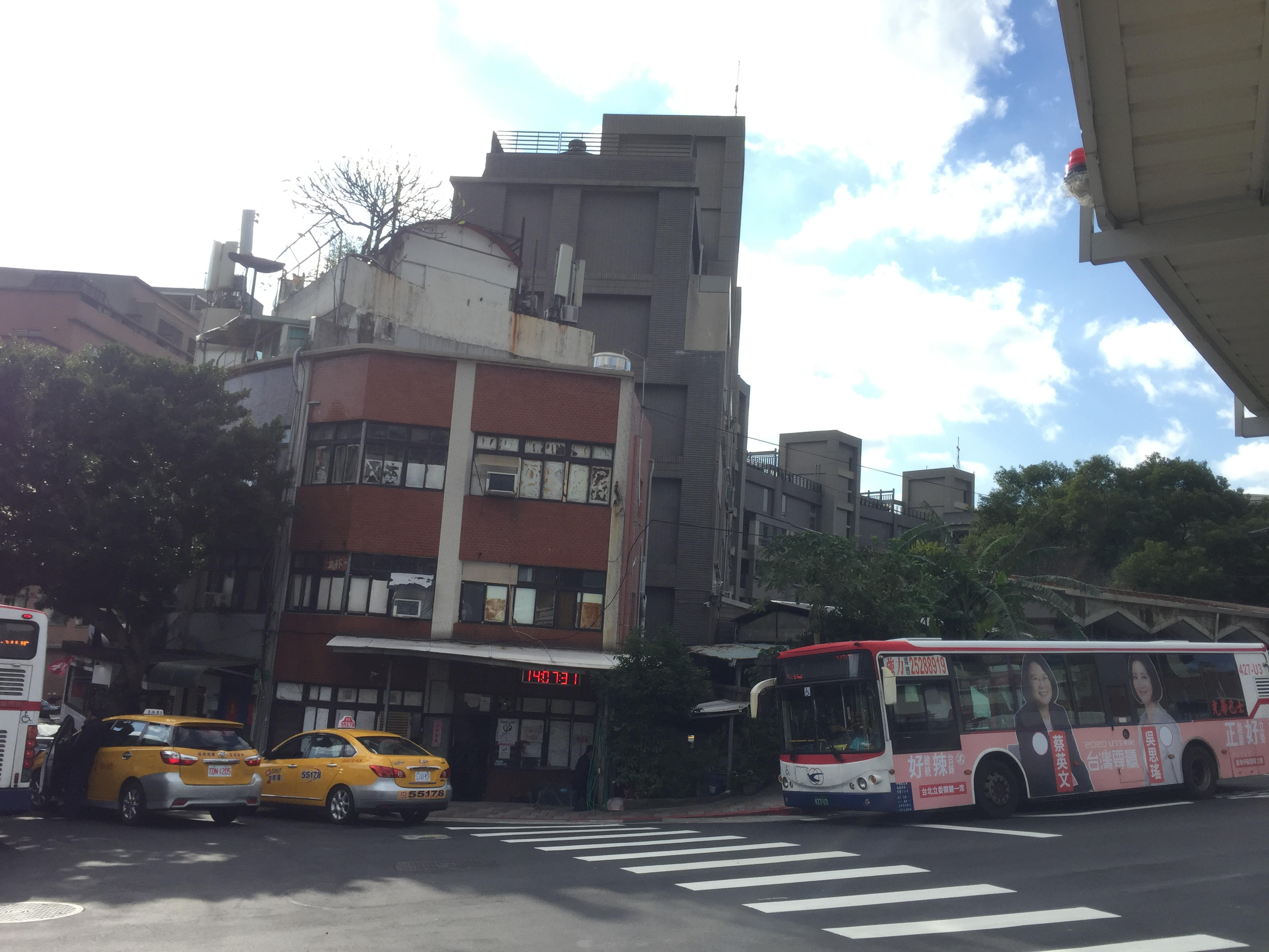 台北市士林區天母里天母圓環旁之光華巴士天西調度站辦公室及公車紅19、224路線一旁調度